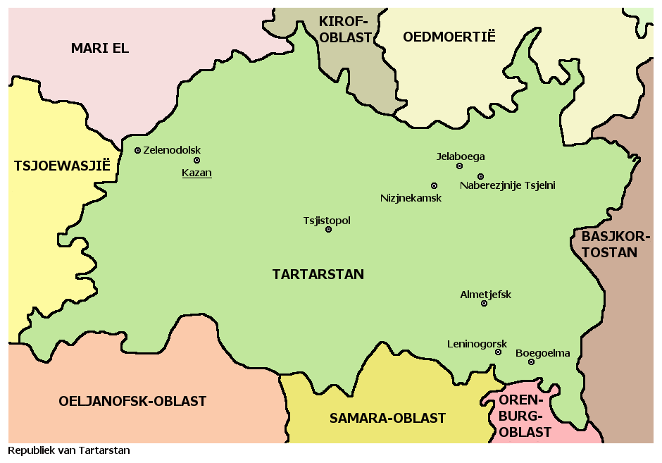 Afrikaanse kaart van Tartarstan, Rusland